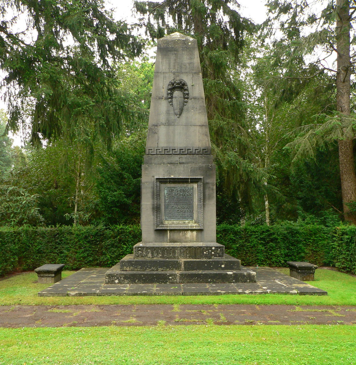 Grabmal Siegmund Seligmann auf Engesohder Friedhof